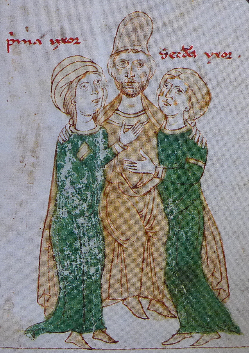 Matthew of Ajello